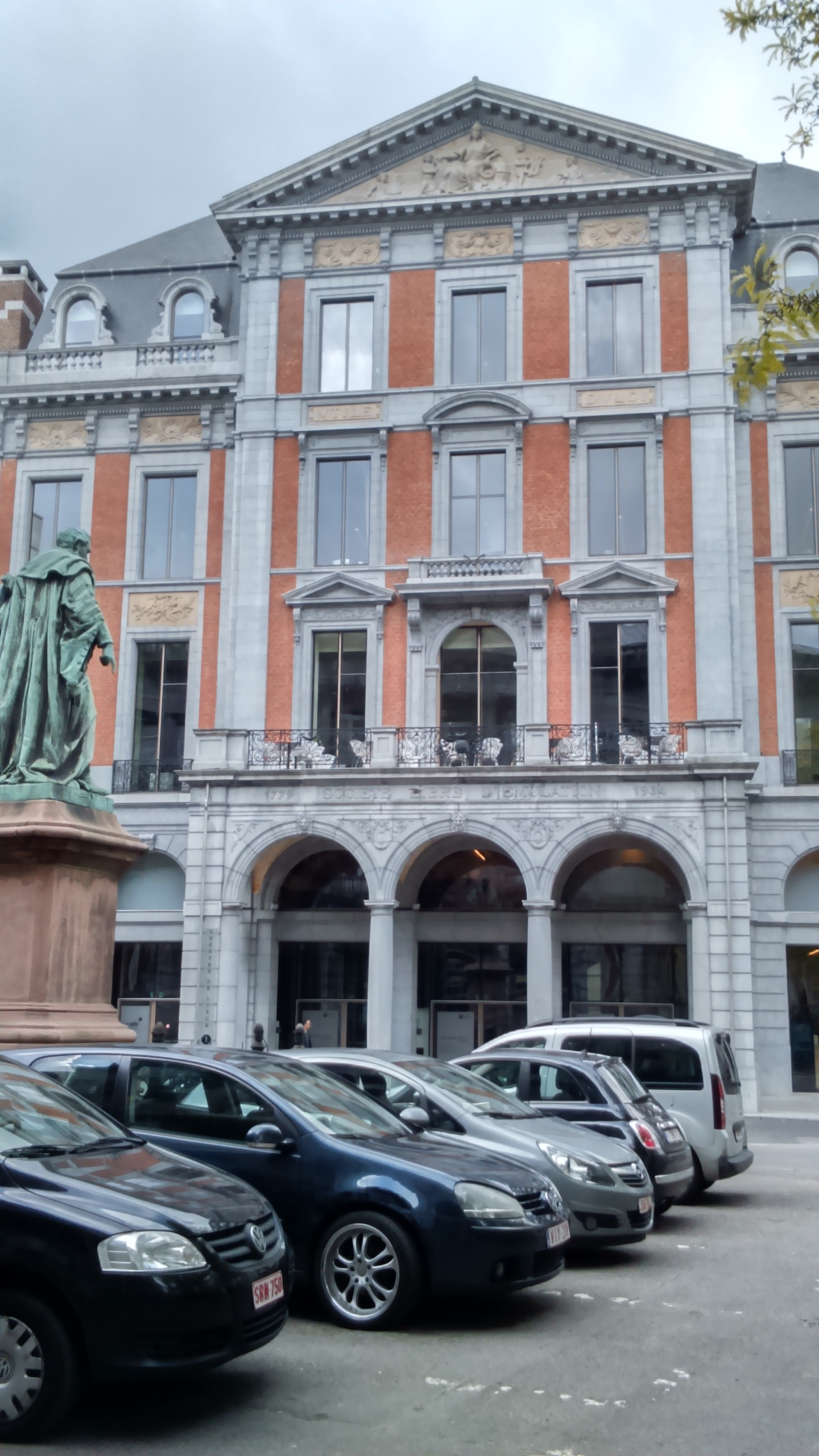 Théâtre de Liège en 2015